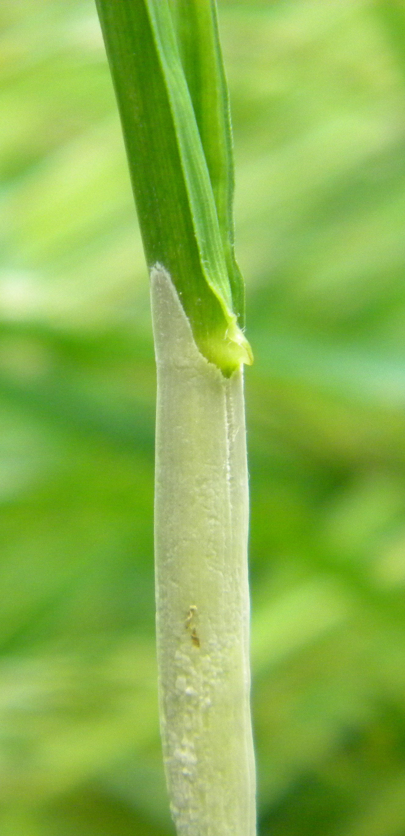 Blanka formo de Epichloë typhina